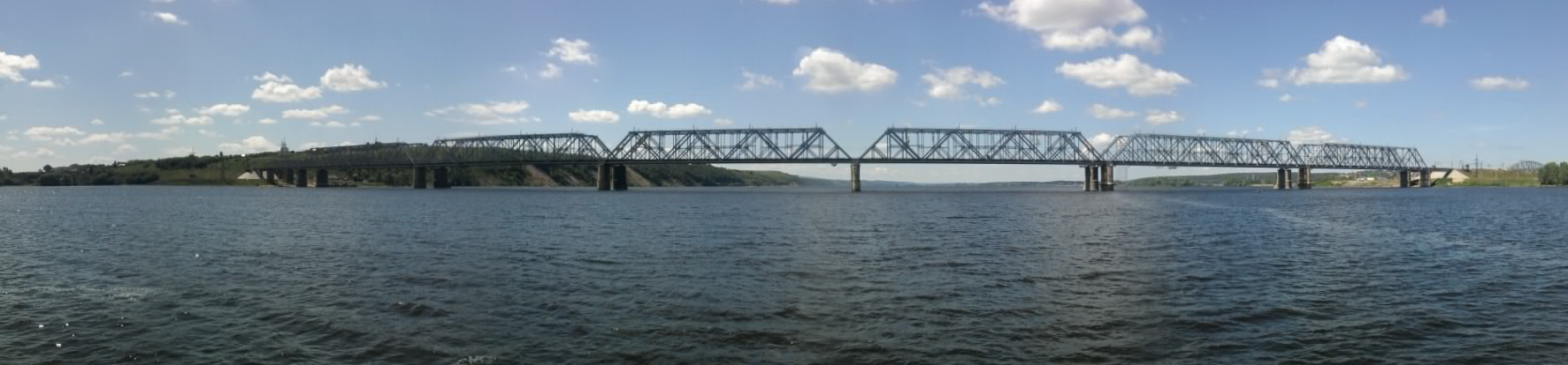 Романовский мост с парома